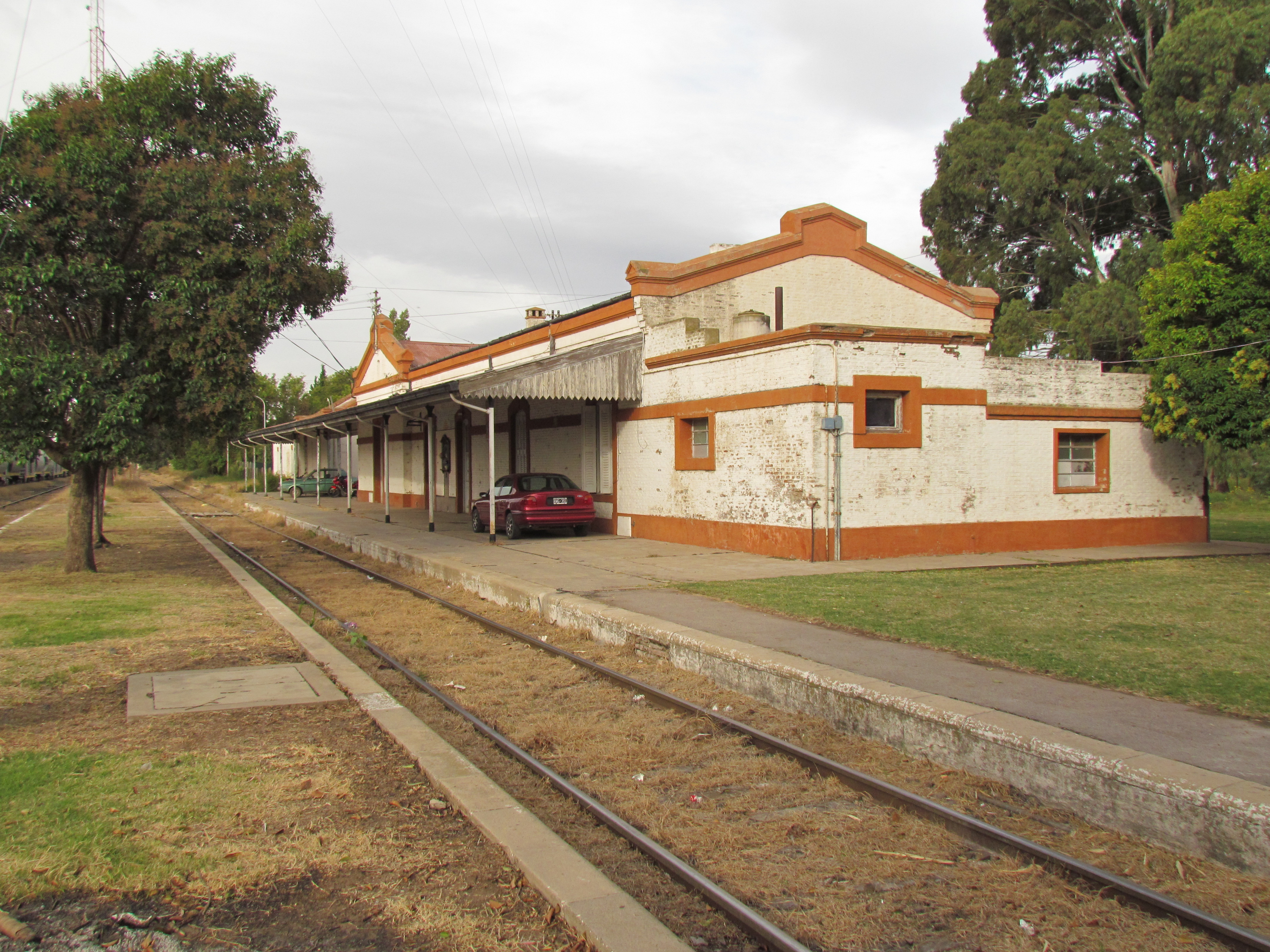 Catriló